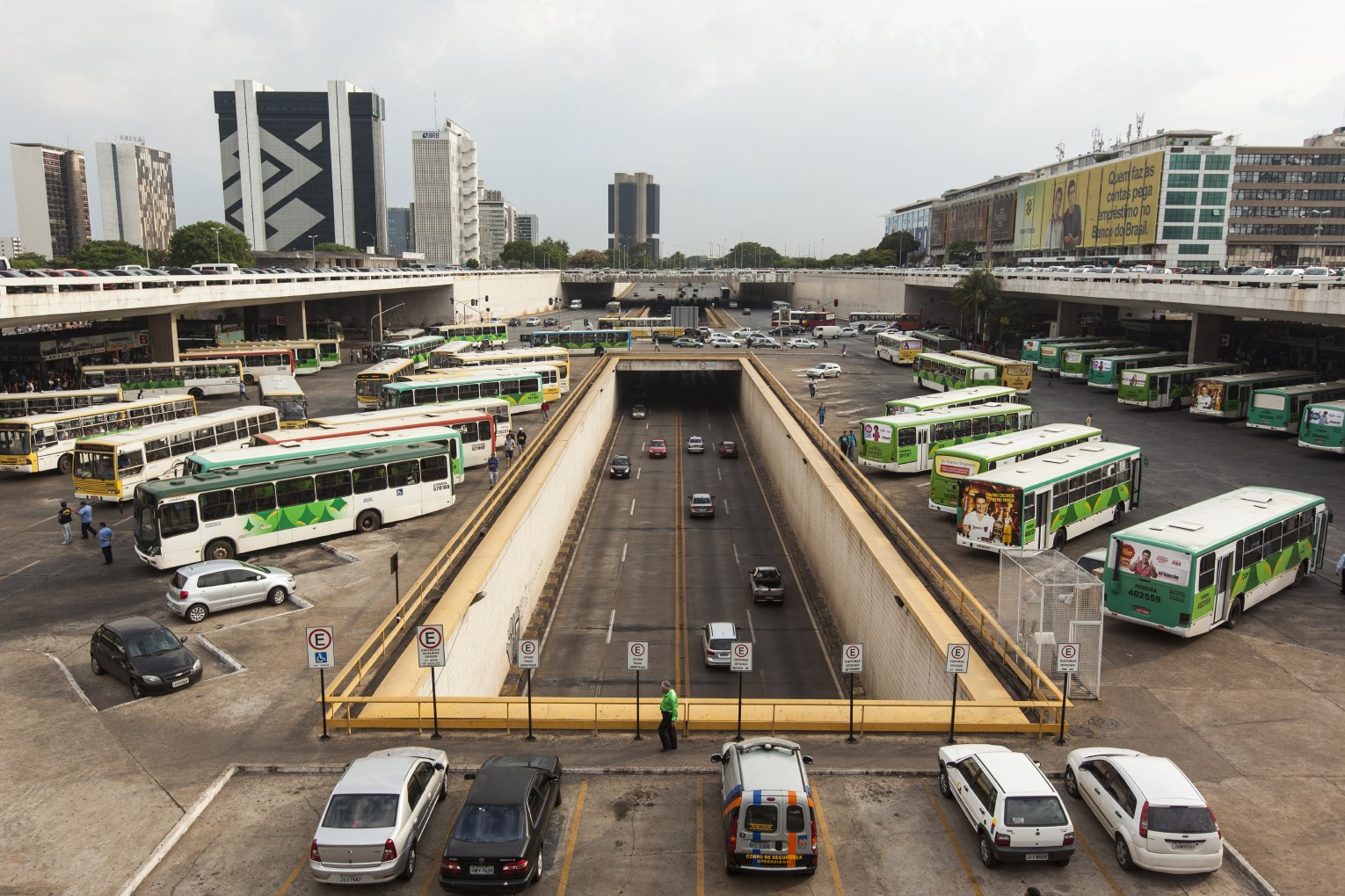 Rodoviária do Plano Piloto e o mergulho do Eixão, em Brasília, Brasil.